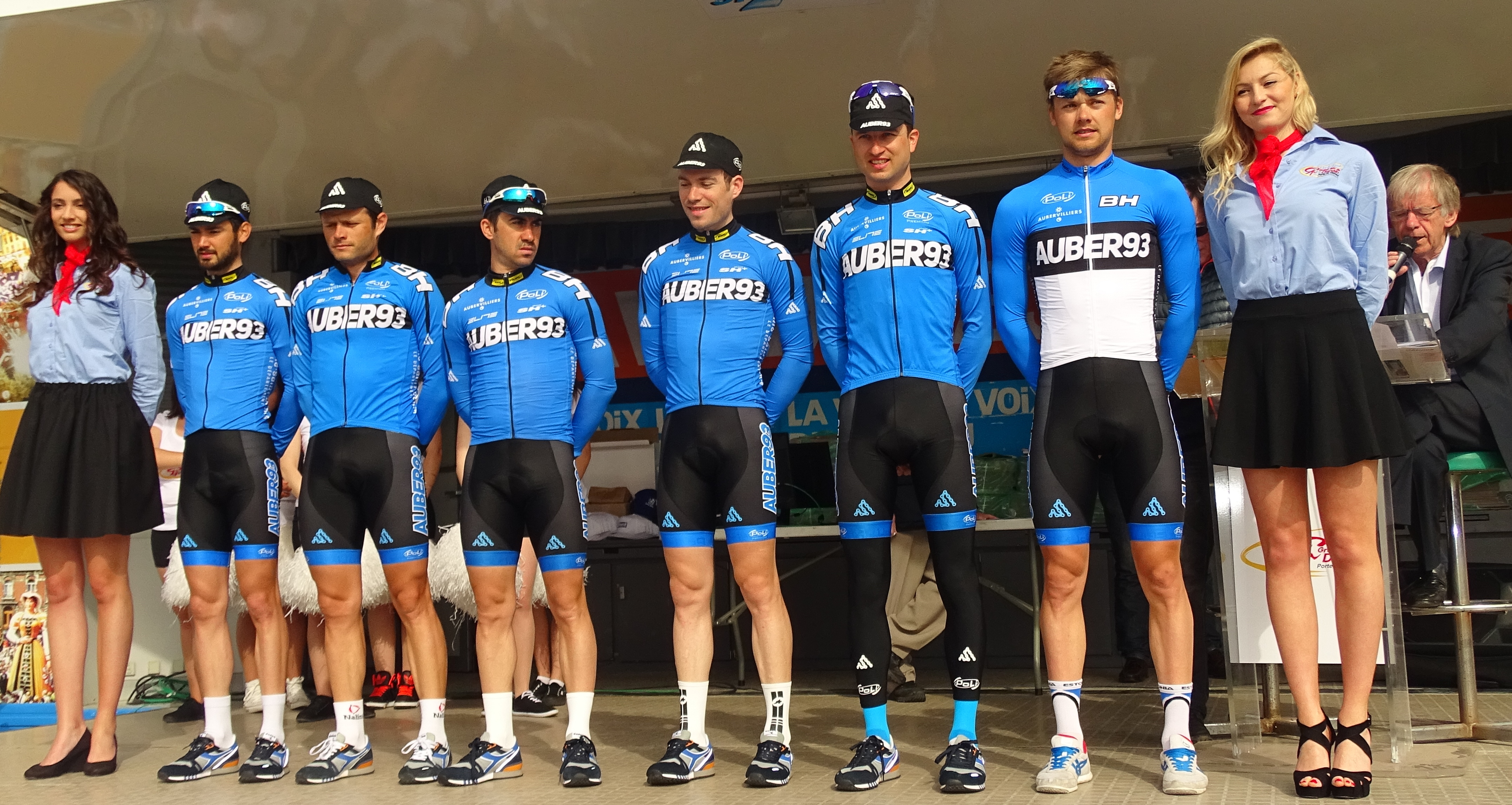 Reportage réalisé le jeudi 16 avril à l'occasion du départ et de l'arrivée du Grand Prix de Denain 2015 à Denain, Nord, Nord-Pas-de-Calais, France.